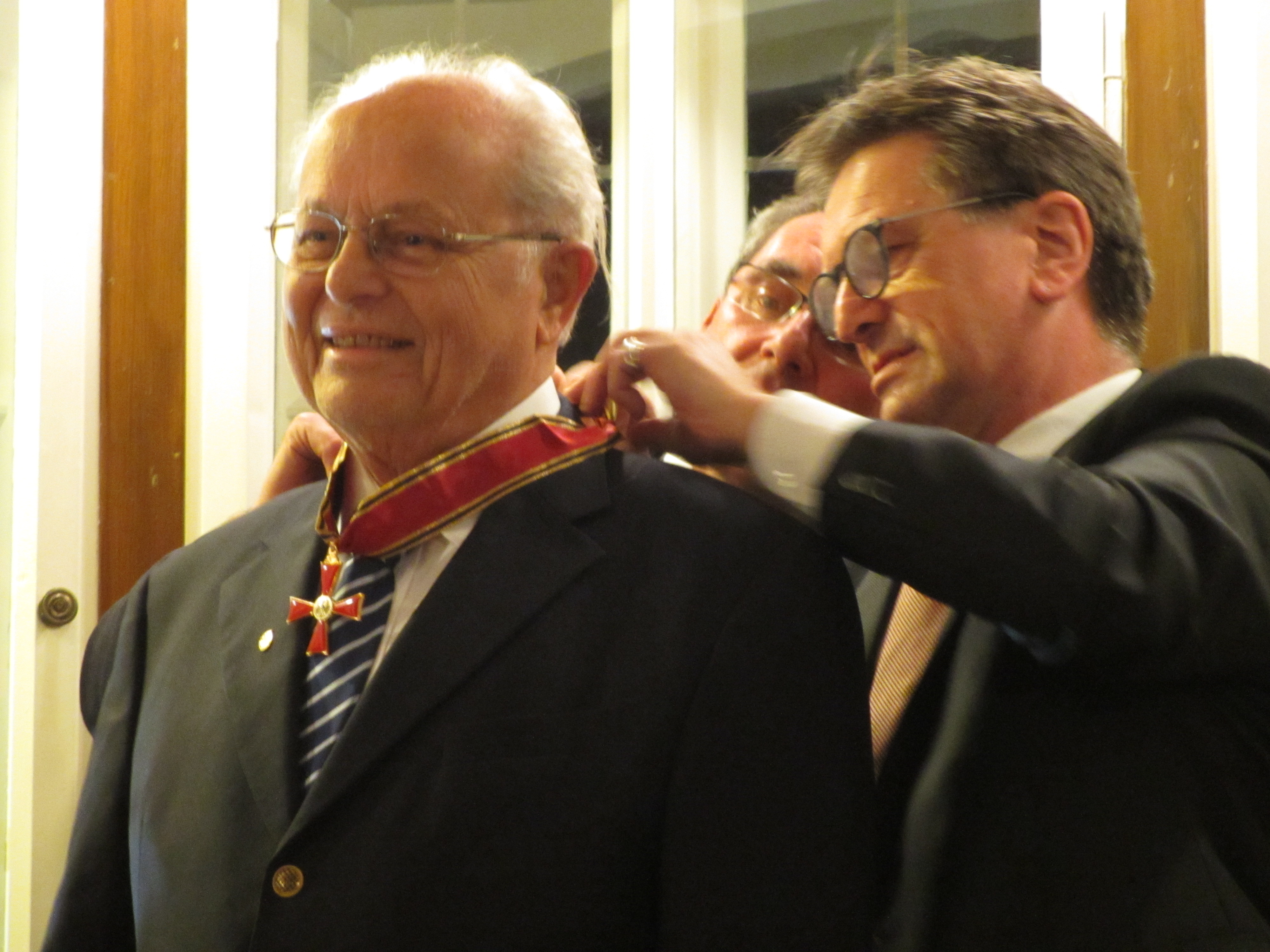 Verleihung des Großen Bundesverdienstkeuzes an Prof. Dr. Dr. Heiko Braak im sog. Herrenzimmer der Villa Lindenhof in Herrlingen (Blaustein), durch den Bürgermeister der Stadt Blaustein Thomas Kayser (Mitte) und den Minister für Soziales und Integration der Landesregierung Baden Württemberg Manfred Lucha (rechts).